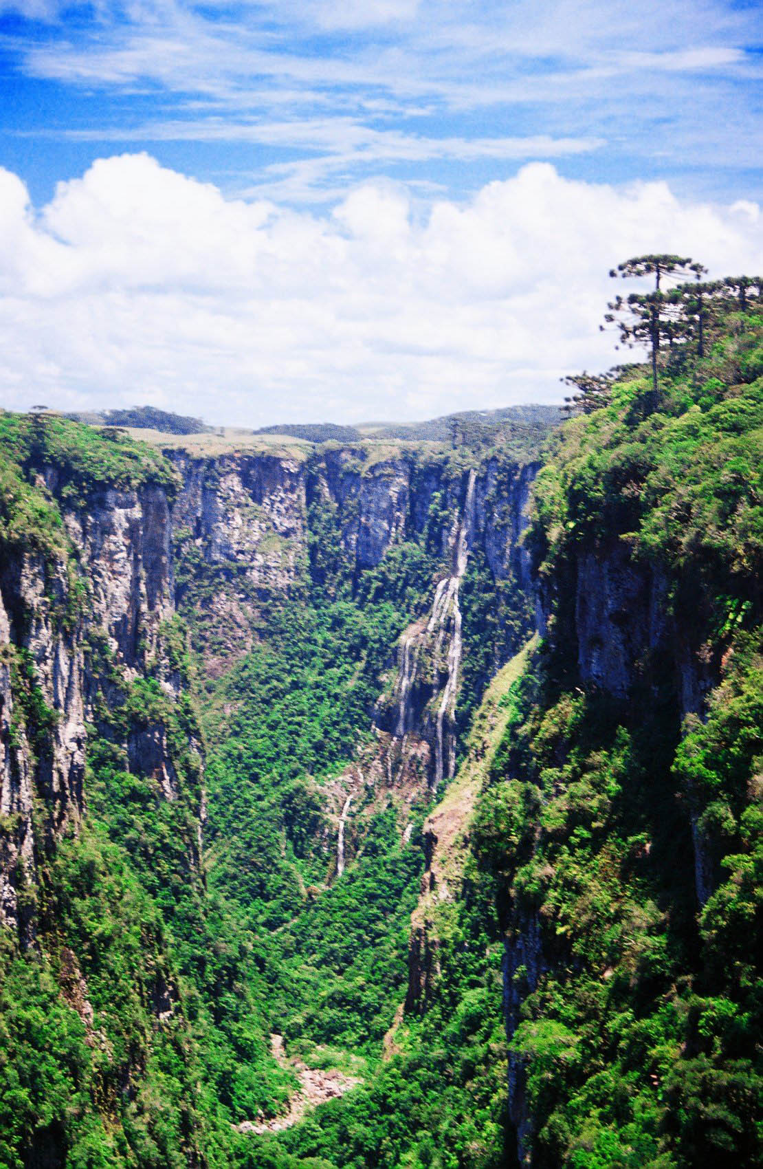 Cachoeira no Canion do Itaimbézinho